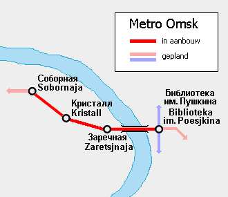 Het in aanbouw zijnde tracé. Kaart van de metro van Omsk